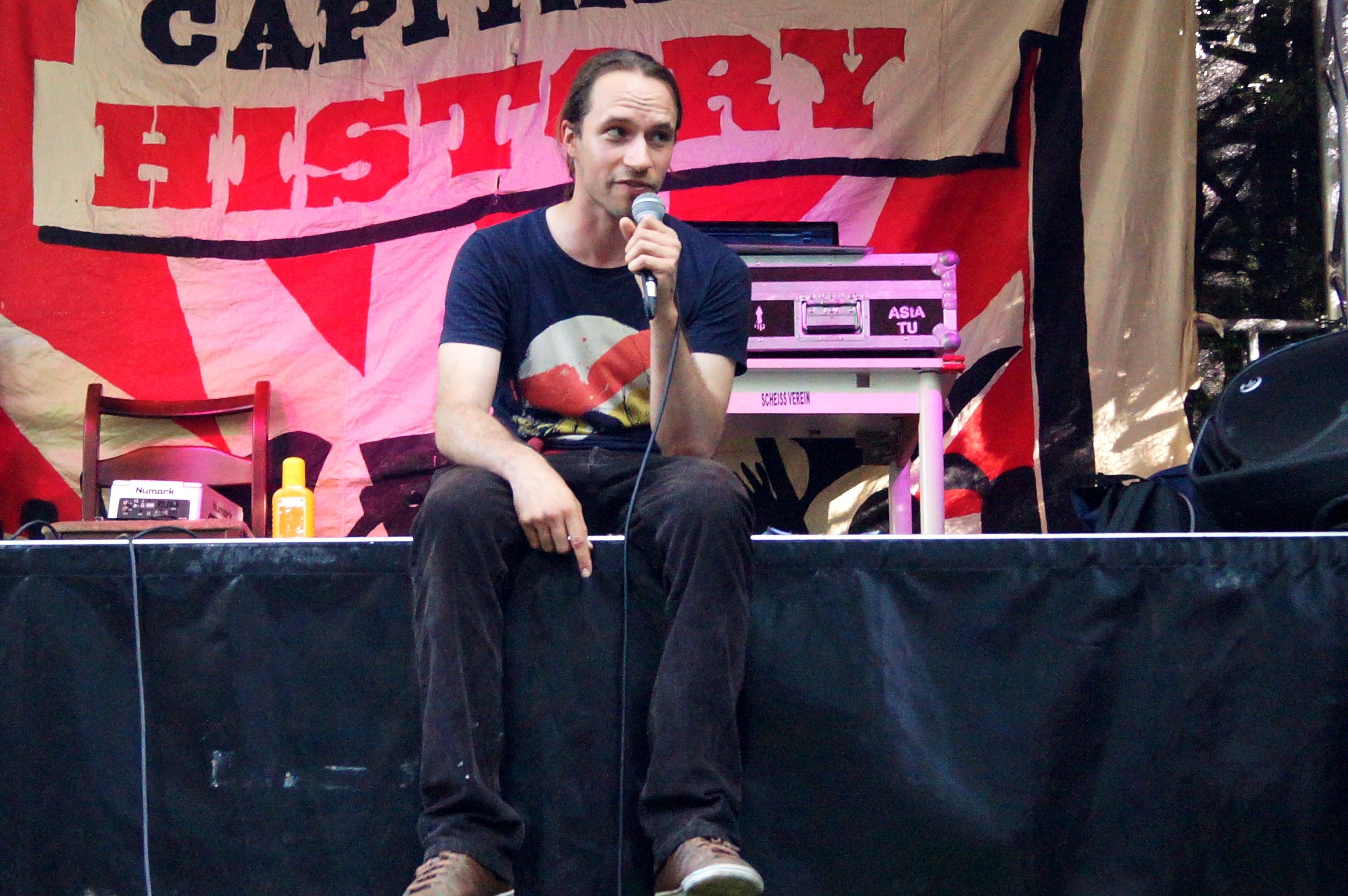 Tapete @ Bizet6 Sommerfest 2014